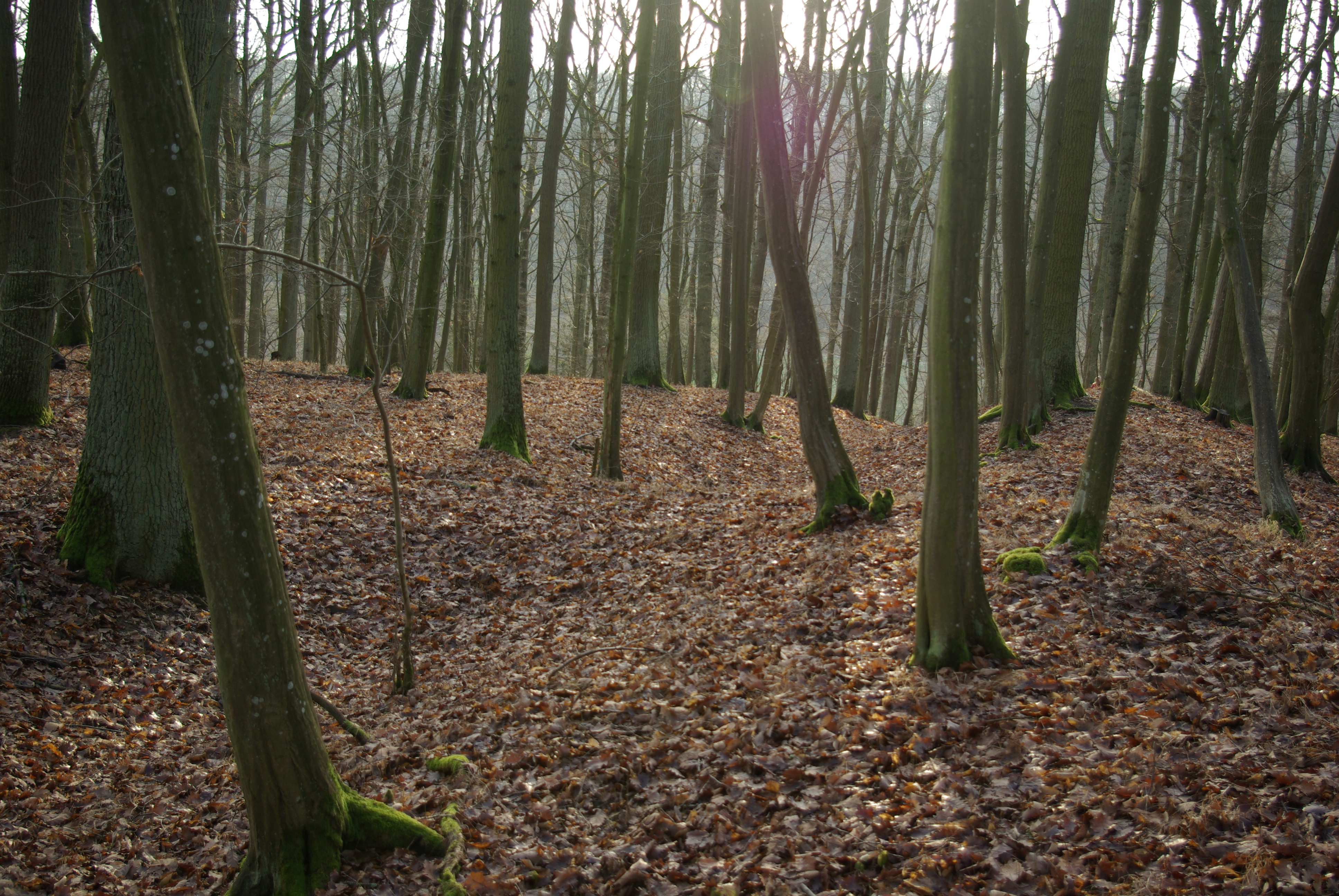 Schwedenschanze Kützberg Wall mit Graben